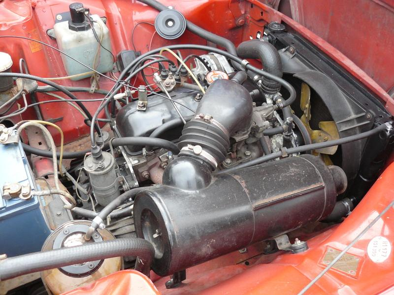 Français cadien: Reims 2012